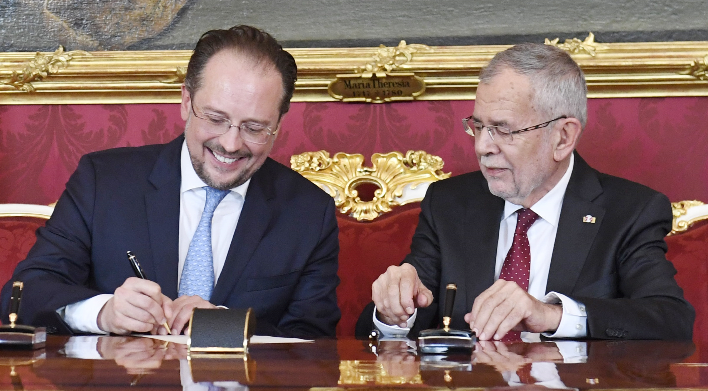 Am 3. Juni 2019 wurde Mag. Alexander Schallenberg als Bundesminister für Europa, Integration und Äußeres angelobt. Foto: Mahmoud